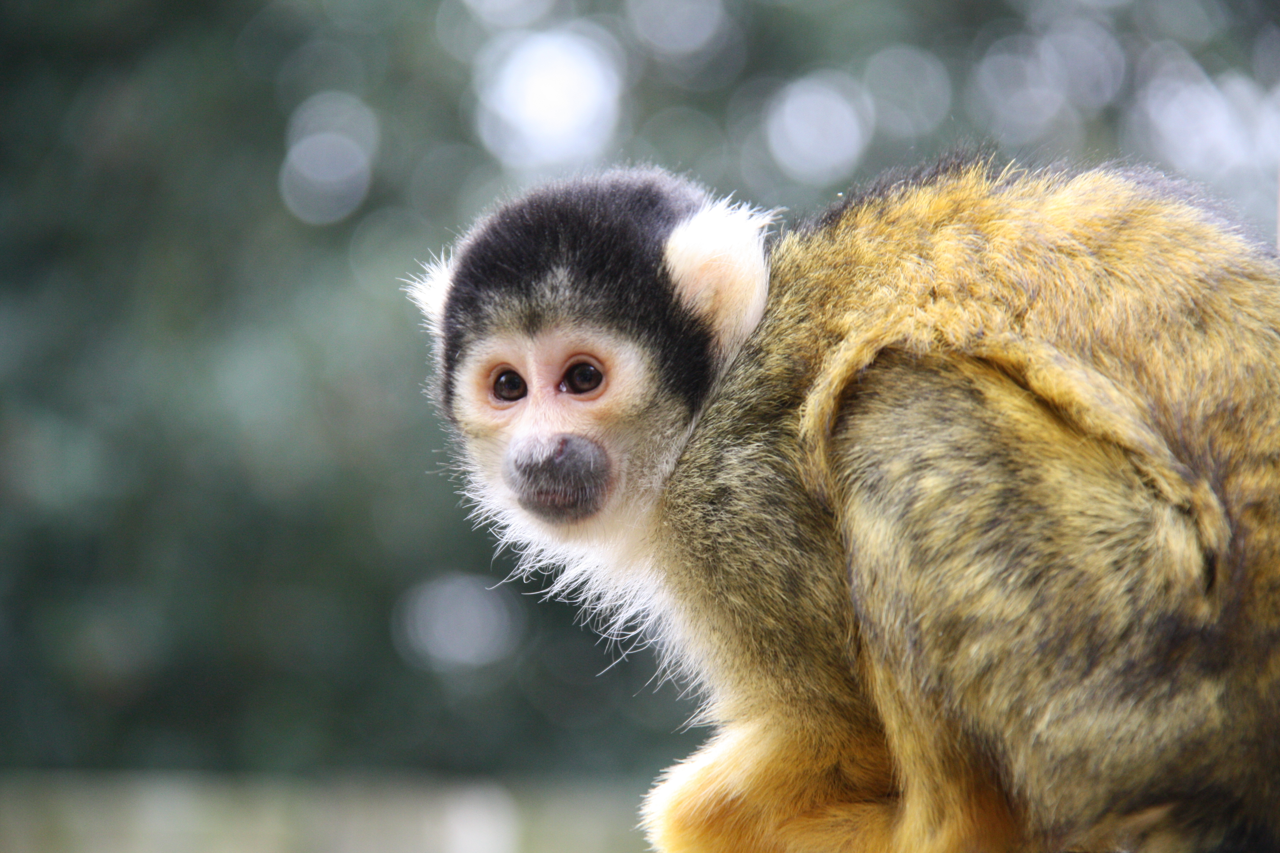 Doodshoofdaapje in het Dierenpark Emmen